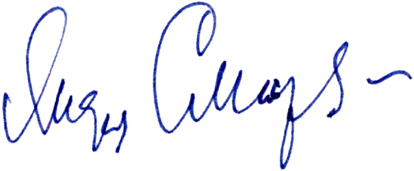 Автограф Лидии Николаевны Смирновой